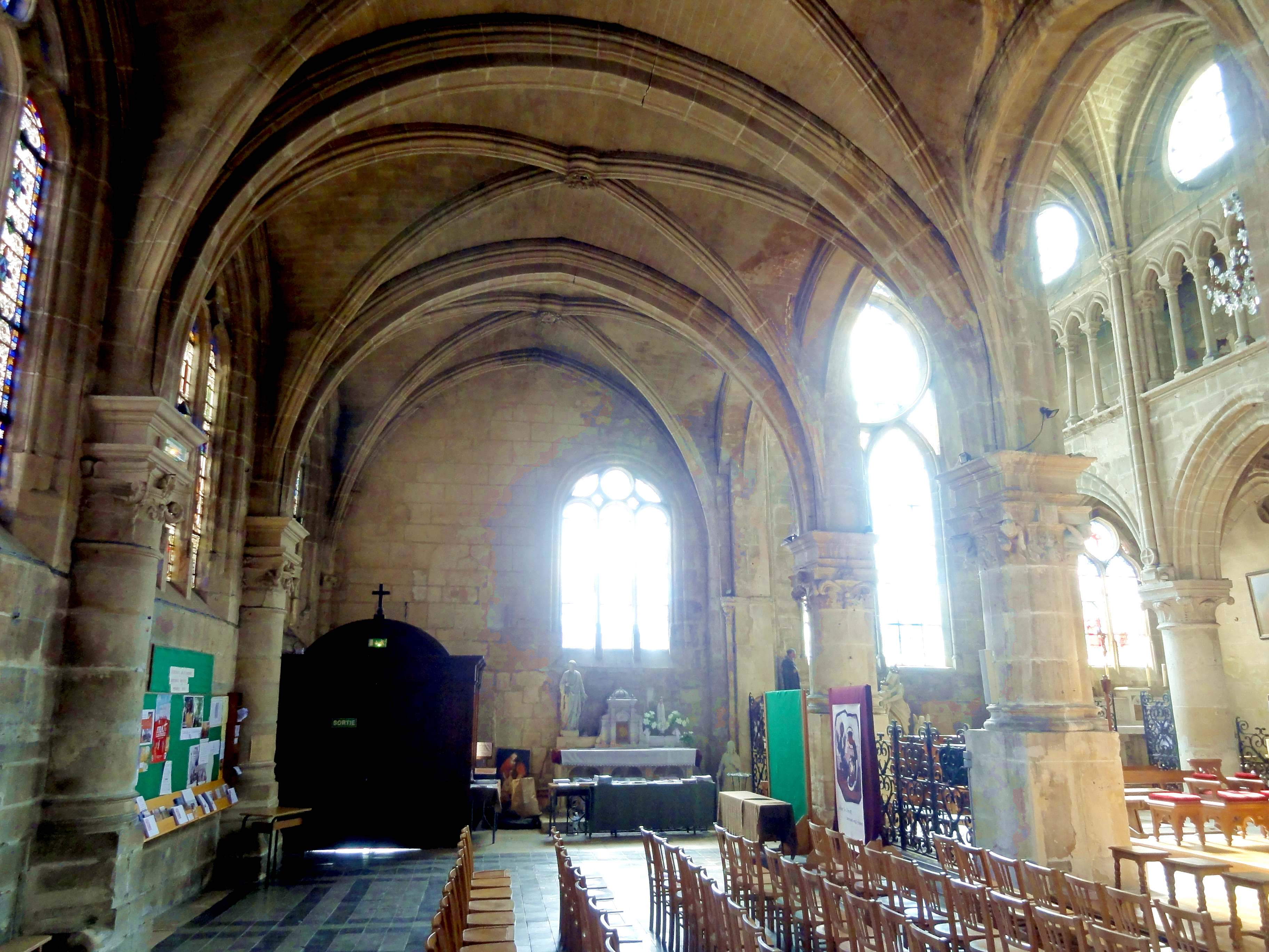 Intérieur de l'église - voir titre.